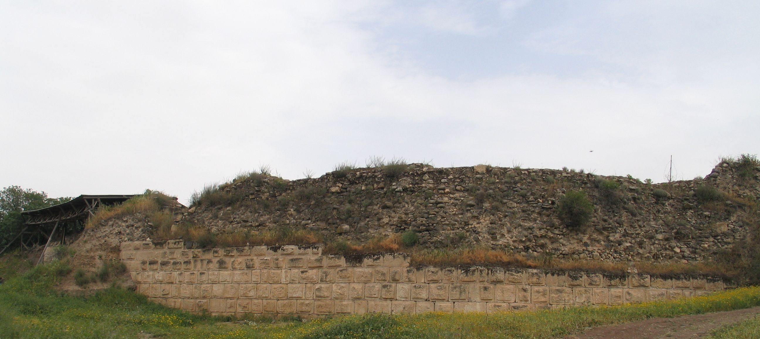 Ateret fortress, Israel.